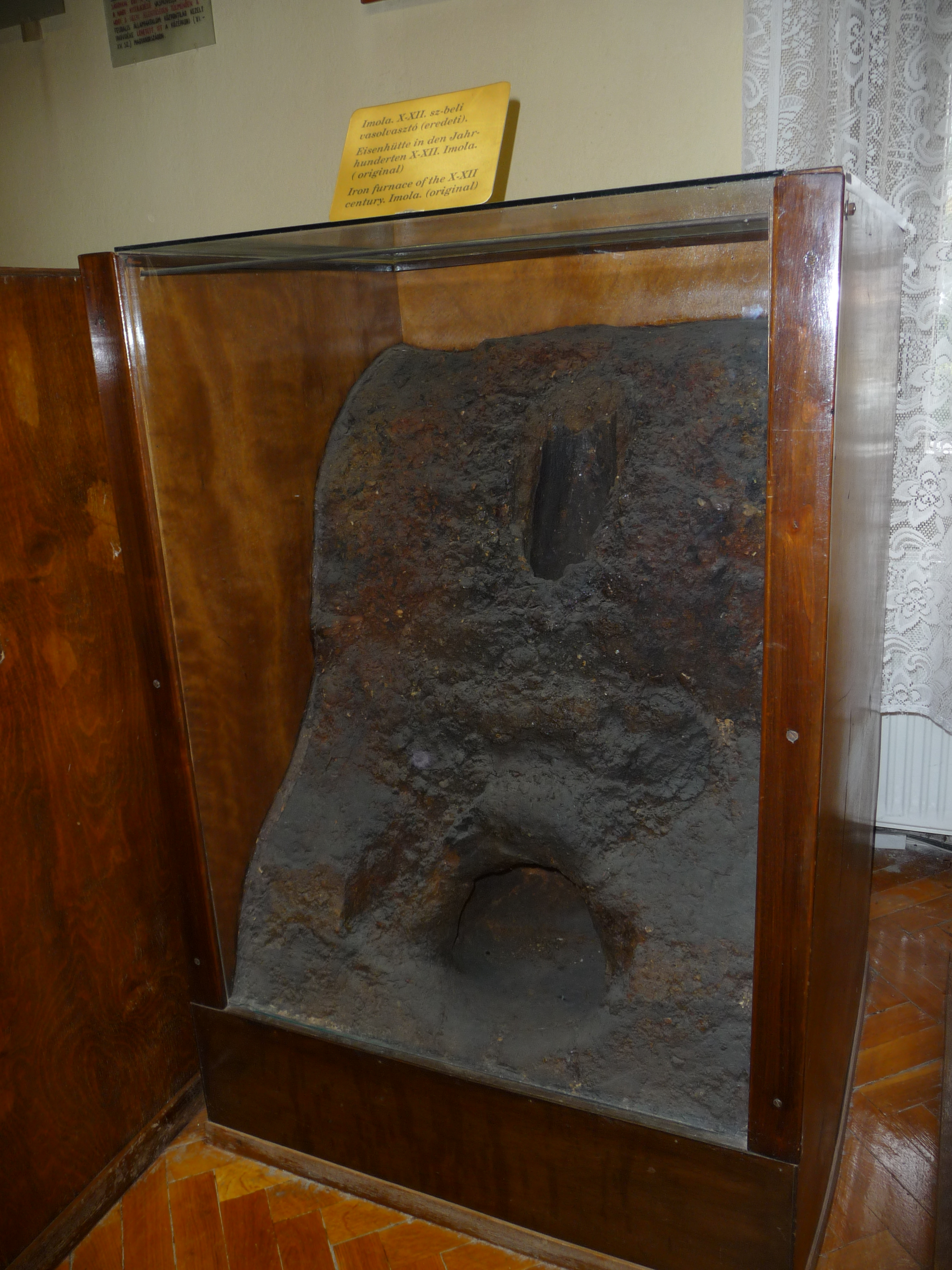 Az Imolán feltárt, Árpád-kori bucakemence a Kohászati Múzeumban, Miskolcon